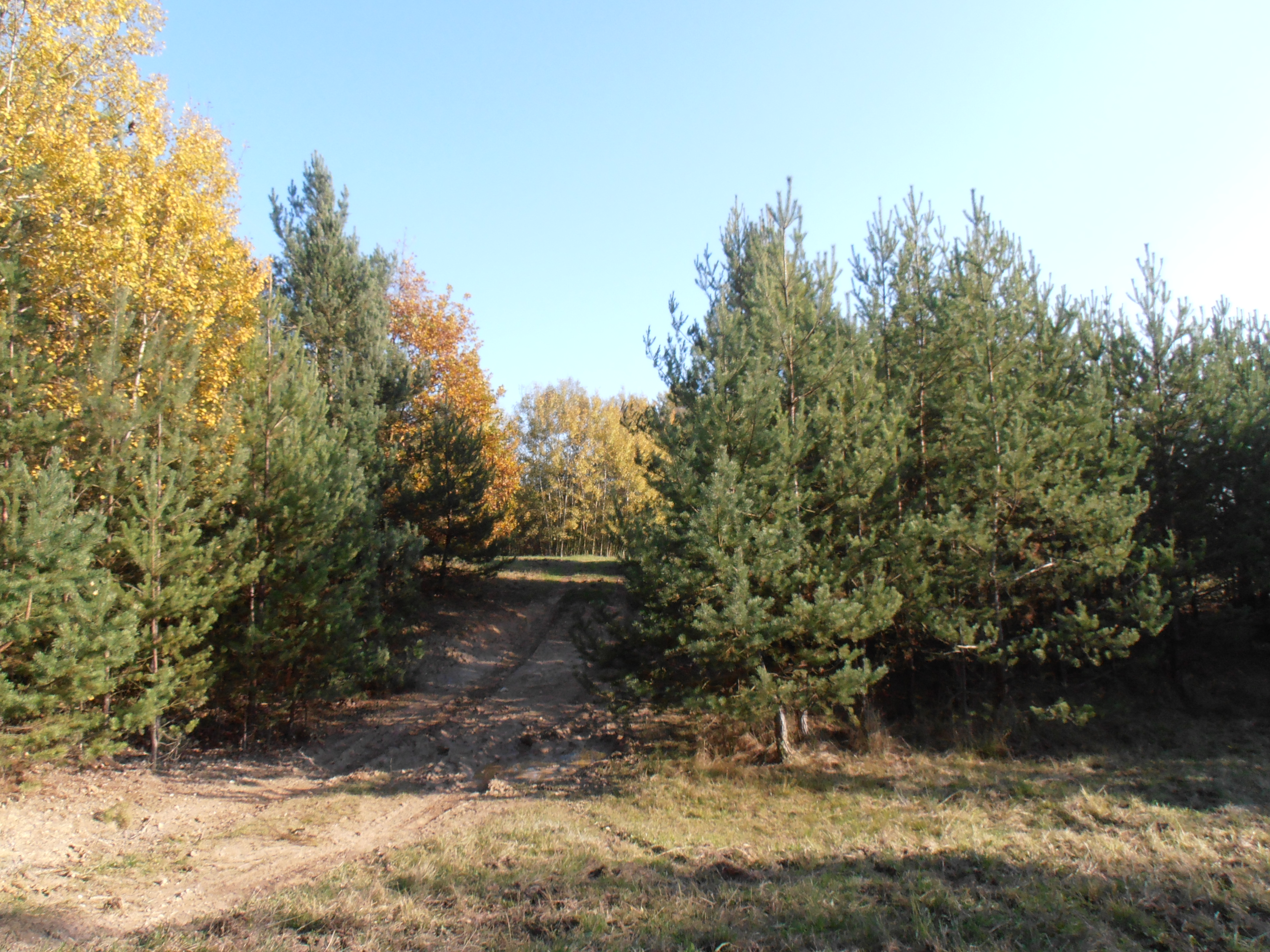 Plocha s původními cestami